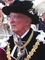 2006年6月19日